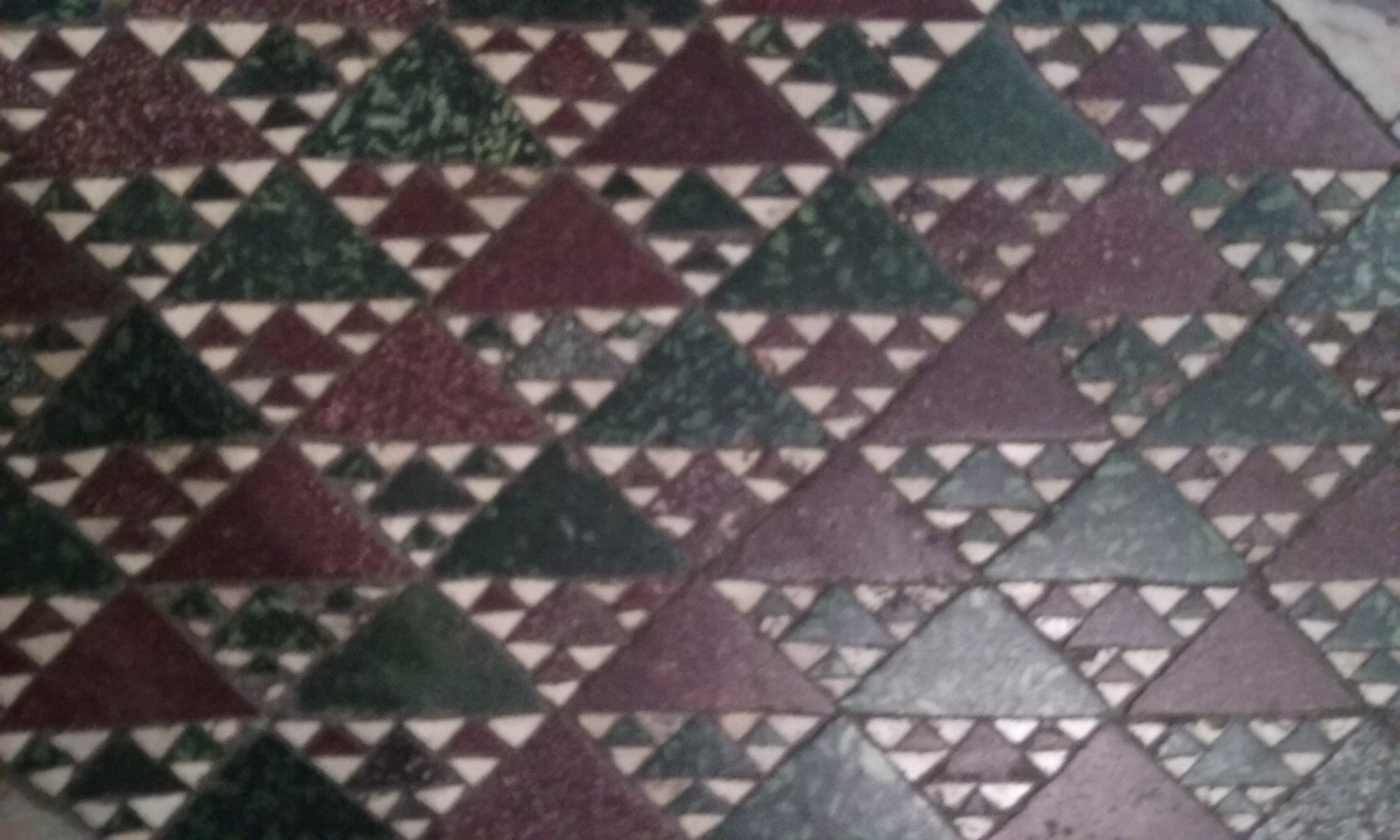 Pavimento de la Iglesia de Santa Maria in Cosmedin (Roma) (siglo VIII), mostrando un patrón de aspecto fractal relacionado con el triángulo de Sierpinski